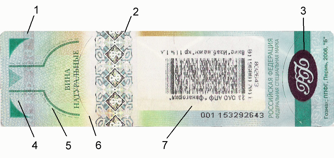 1 — Защитная металлическая нить 2 — Голограмма 3 — Аббревиатура РФ при наблюдении под углом меняет цвет 4 — При наблюдении под углом видна надпись «Россия» 5 — Микротекст «Федеральная специальная марка» 6 — Фигурная надсечка предотвращает повторное использование марки 7 — Участок при нагревании меняет цвет